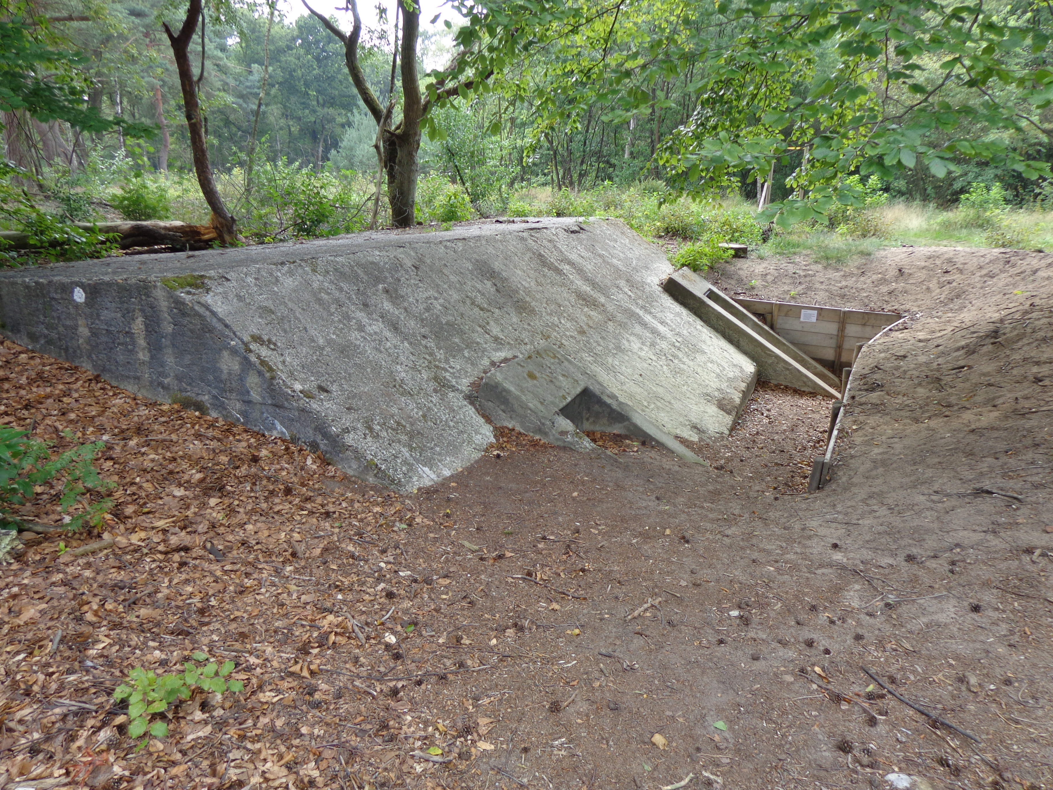 Bunker type 1918 II in de Franse Kamp te Bussem